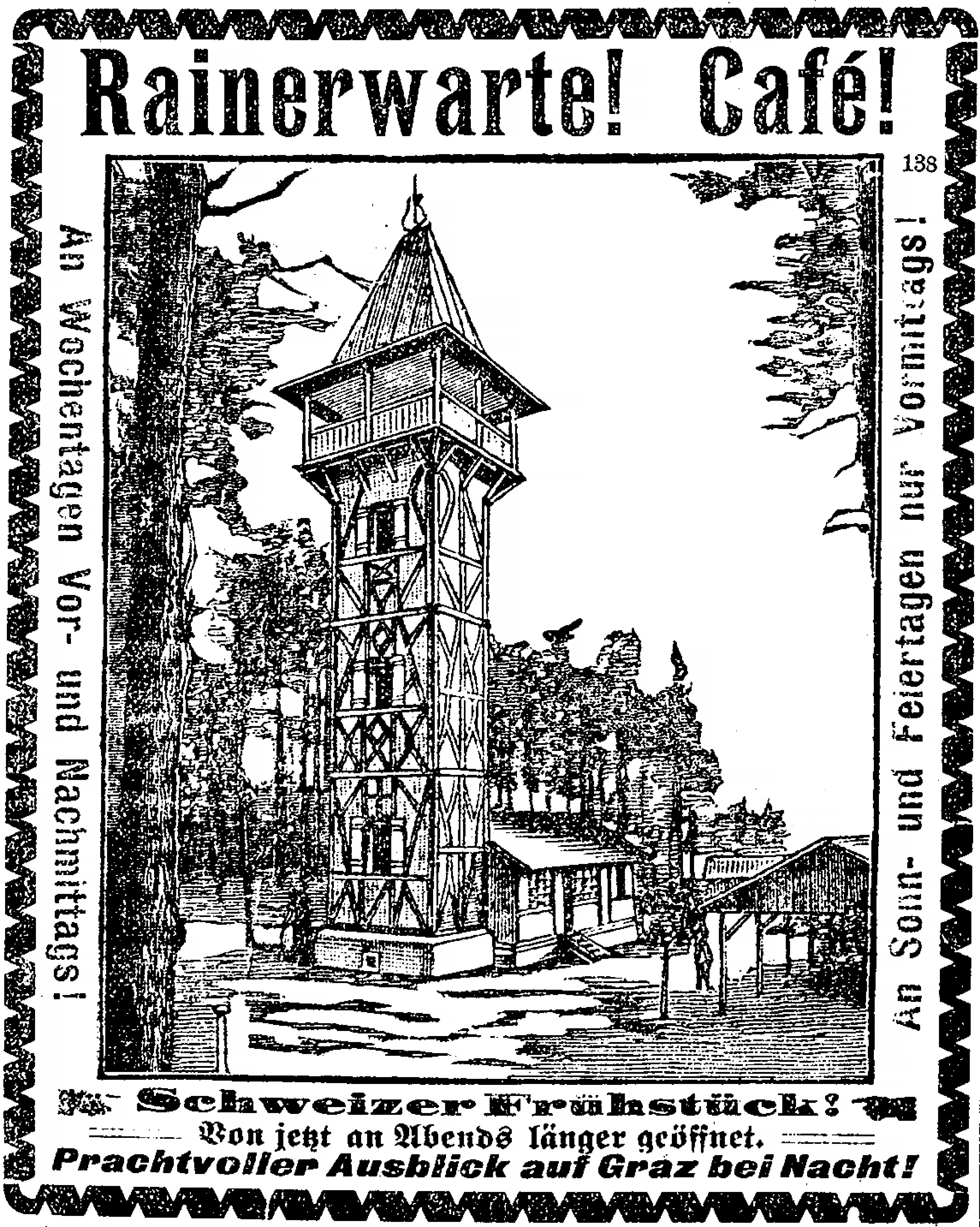 Graz-Andritz, Rainerwarte (heute: Reinerkogelwarte, Werbeeinschaltung (1902)